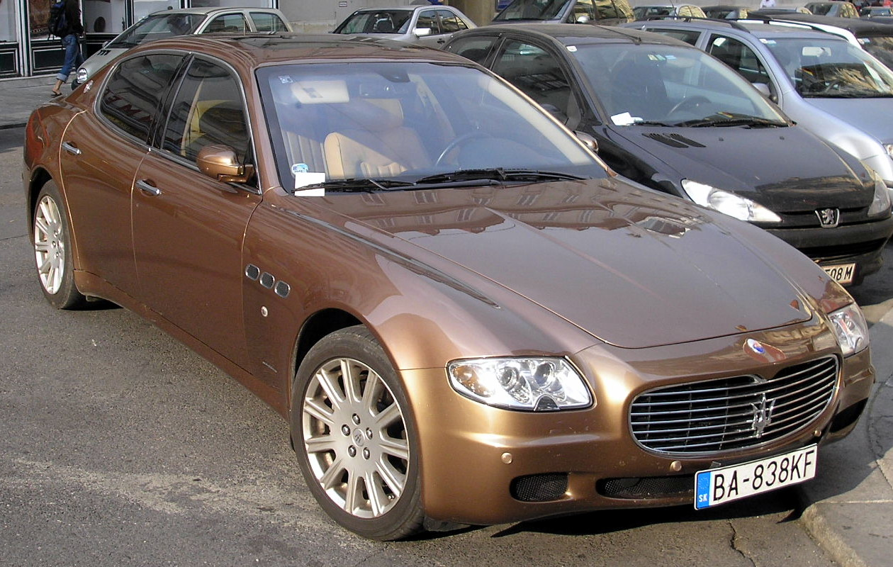 Maserati car in Vienna.